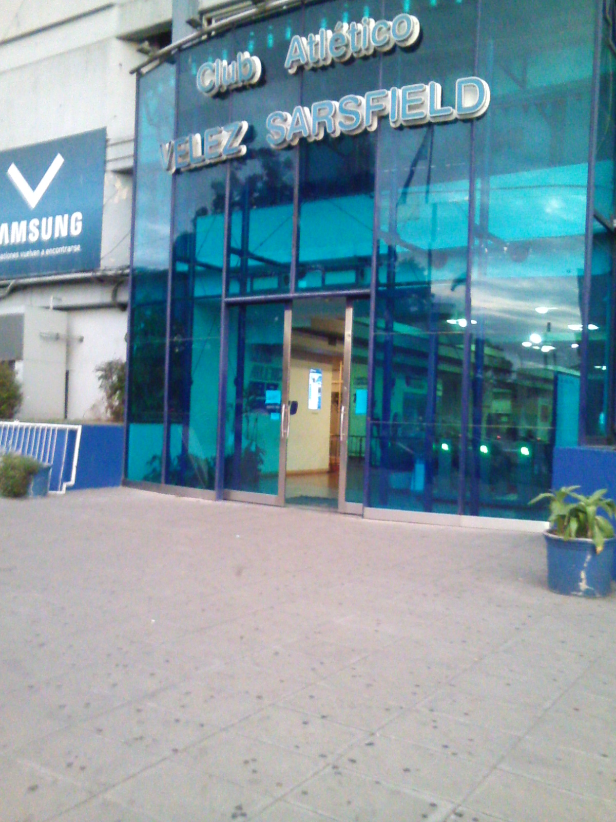 La sede del Club Atlético Vélez Sarsfield. Puede observarse la fachada hecha de vidrio.